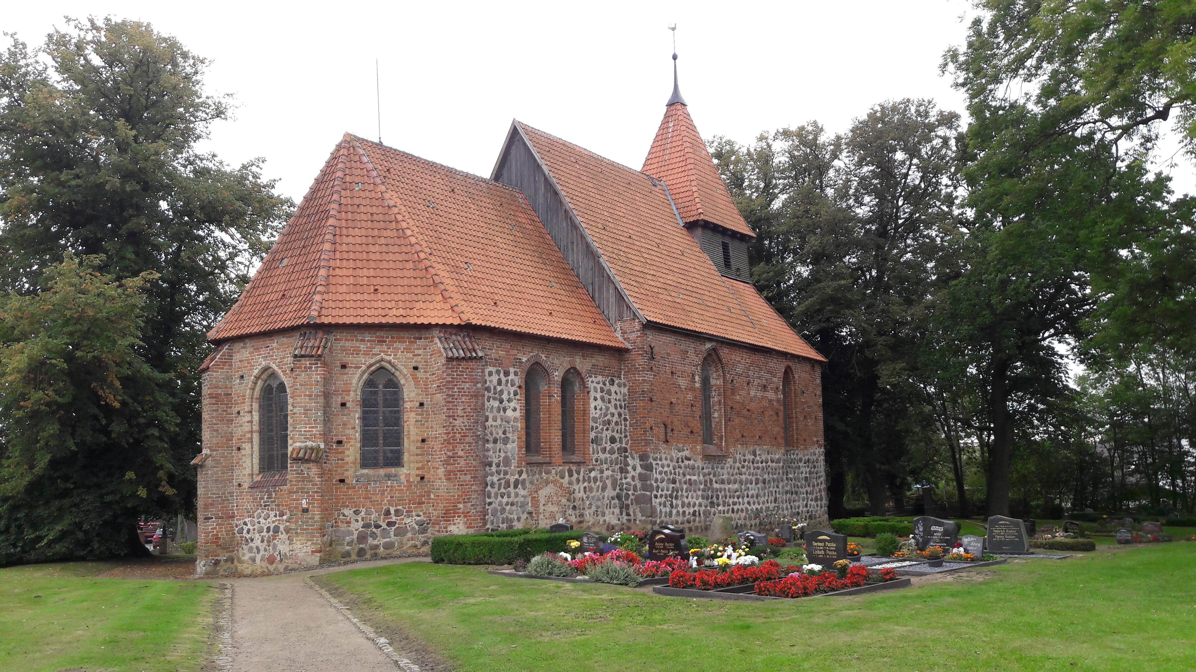 Deutschland, Mecklenburg-Vorpommern, Liste der Baudenkmale in Satow Nr. 7